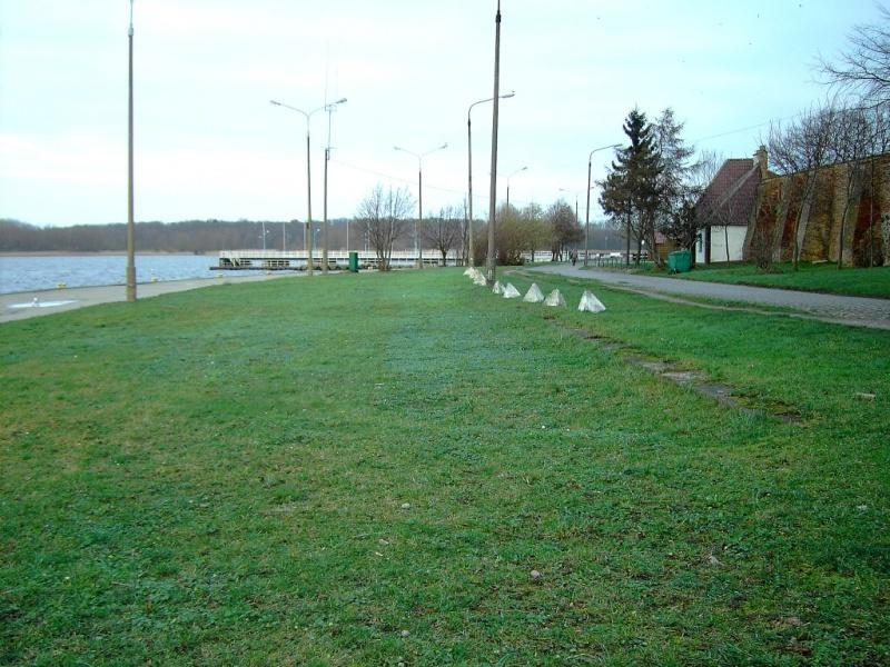 Linia kolejowa Kamień Pomorski - Kamień Pomorski Port